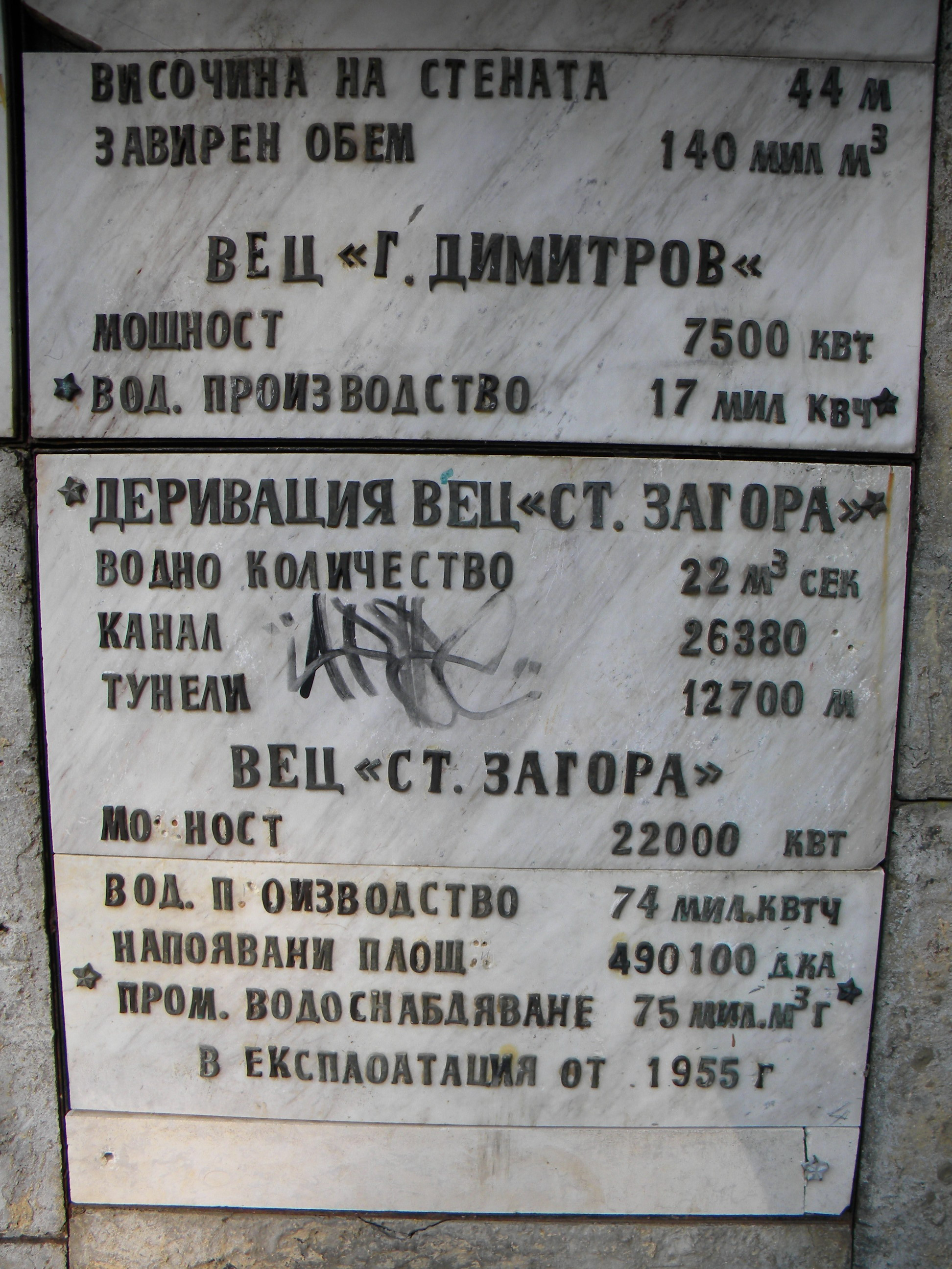 Данни за язовир "Копринка"